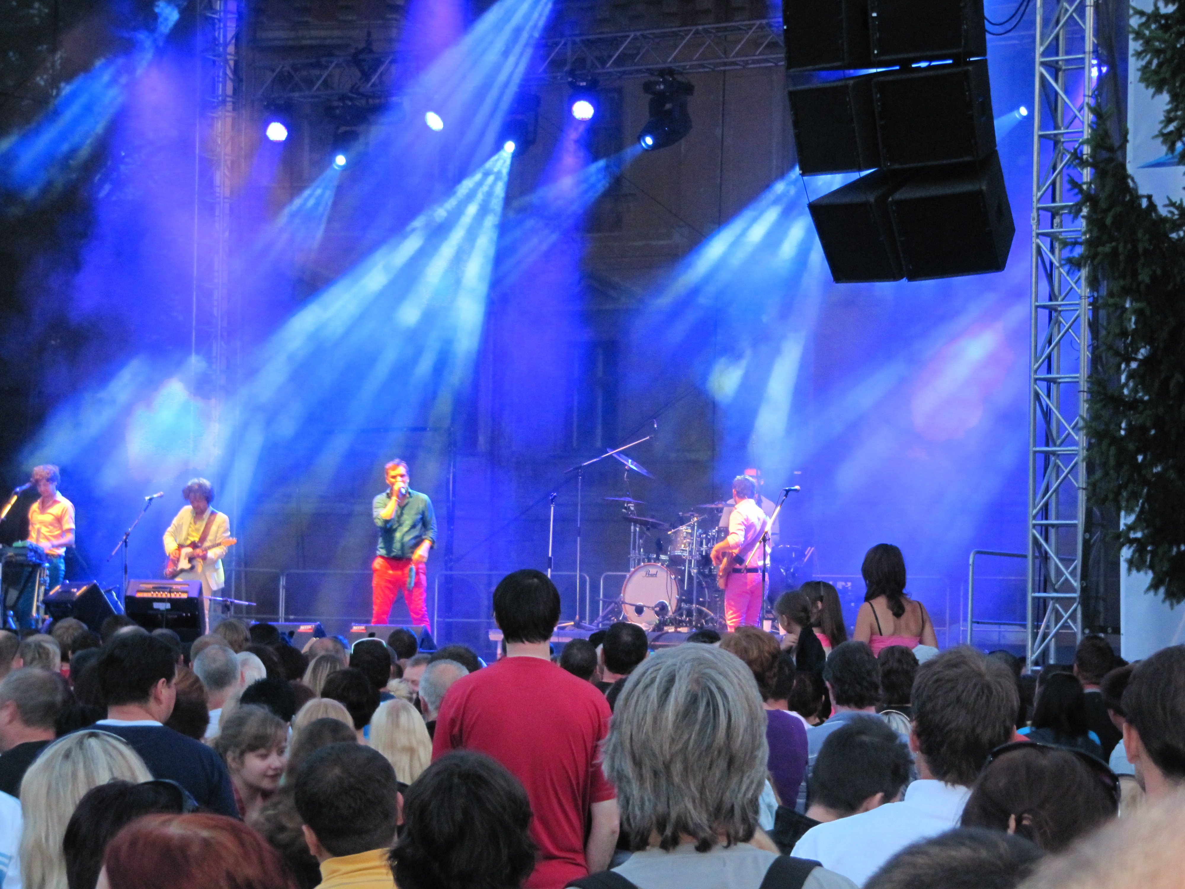 Mig 21 (hudební skupina)